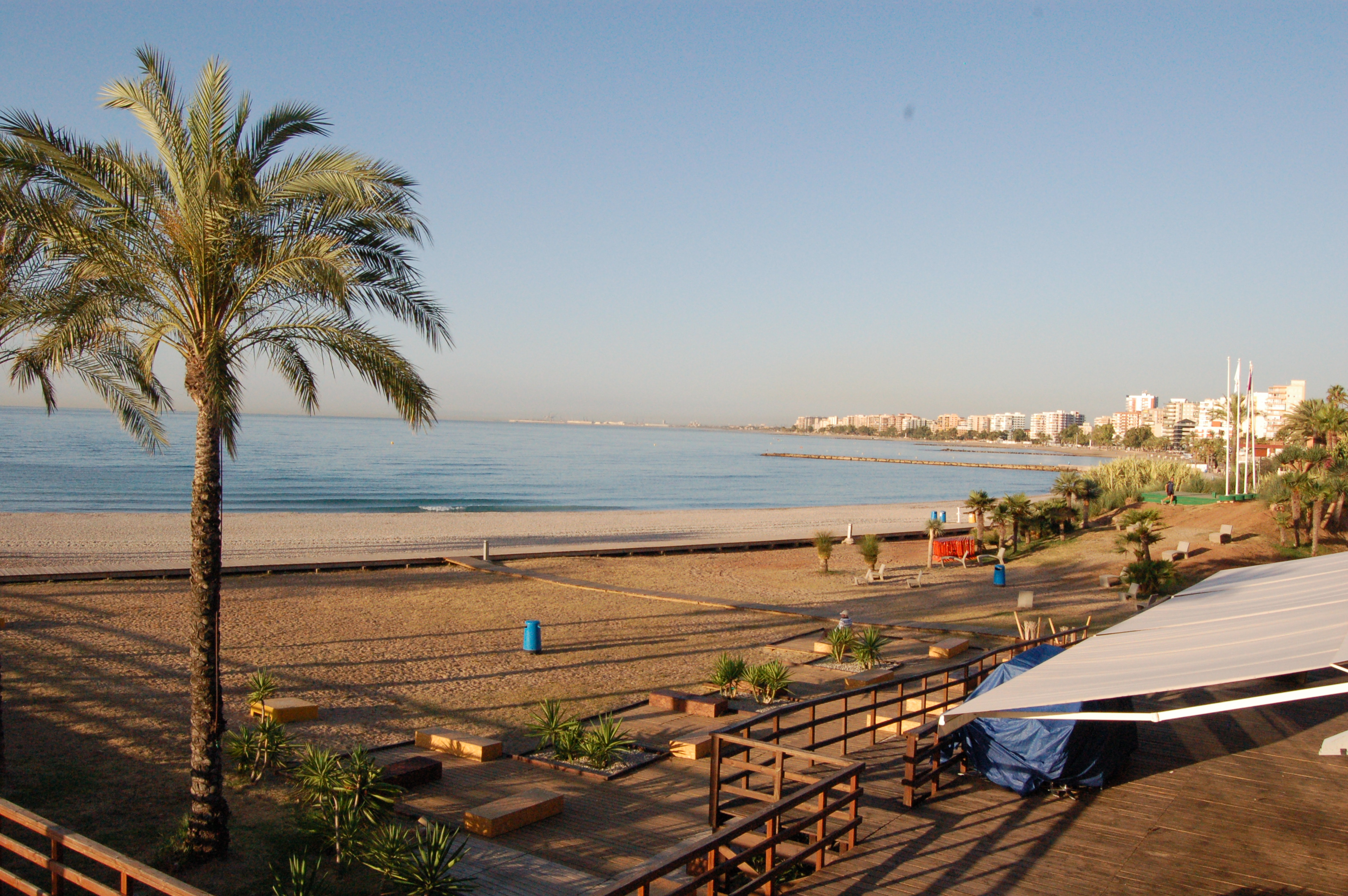 Playa de benicassim